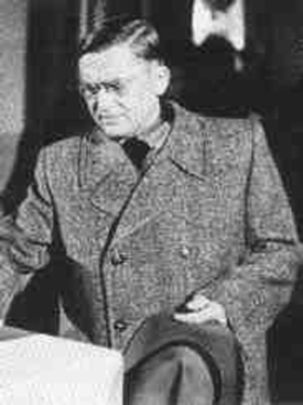 Aleksander Zawadzki . Emax